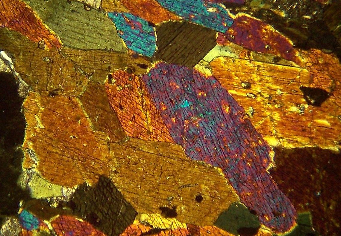 Amphibolites